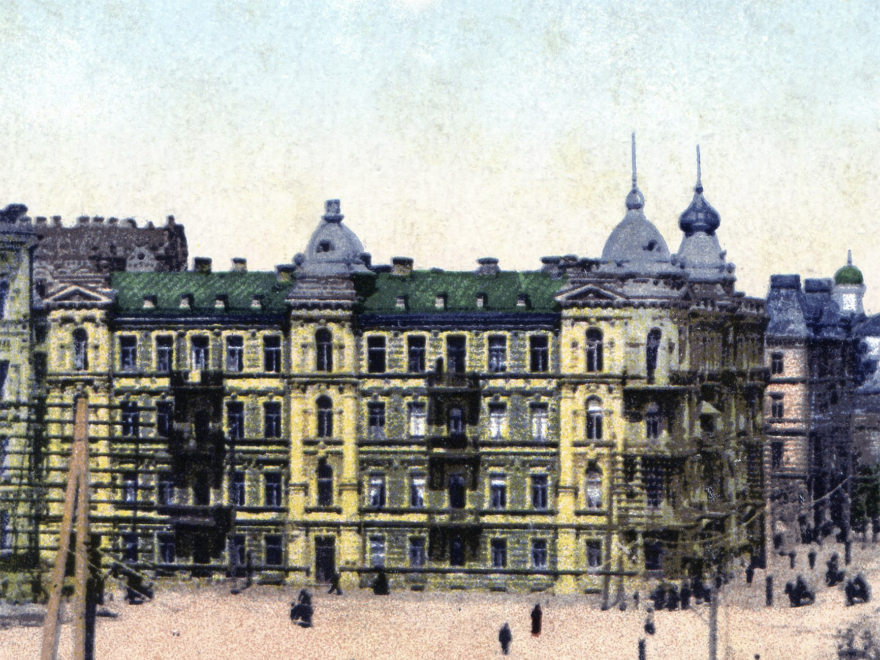 Будинок на Володимирській